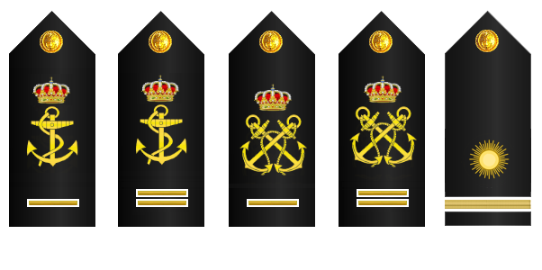 Divisas alumnos de la ENM Intendencia